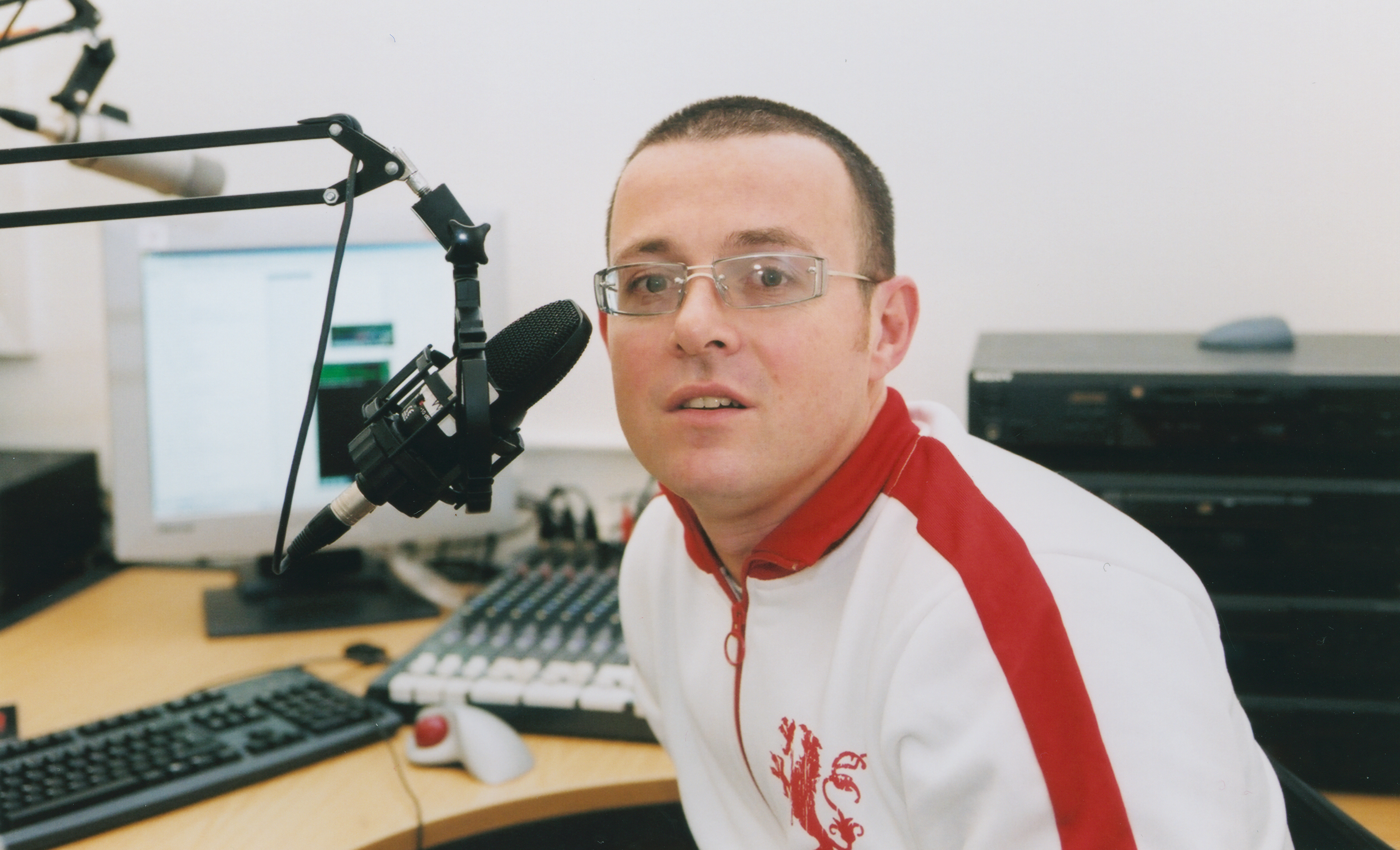 IMAGELIBRARY/889 Persistent URL